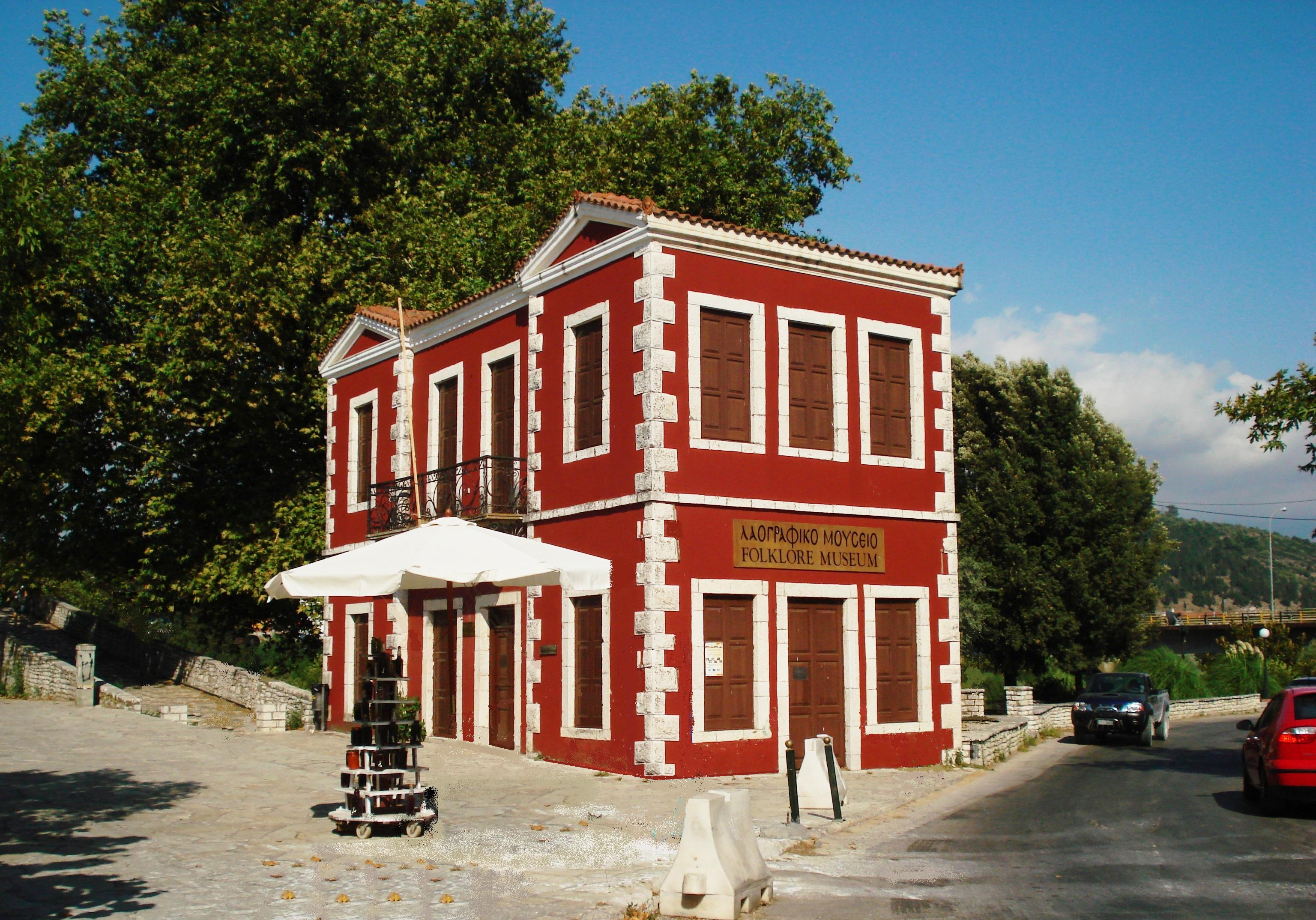 Λαογραφικό Μουσείο Άρτας